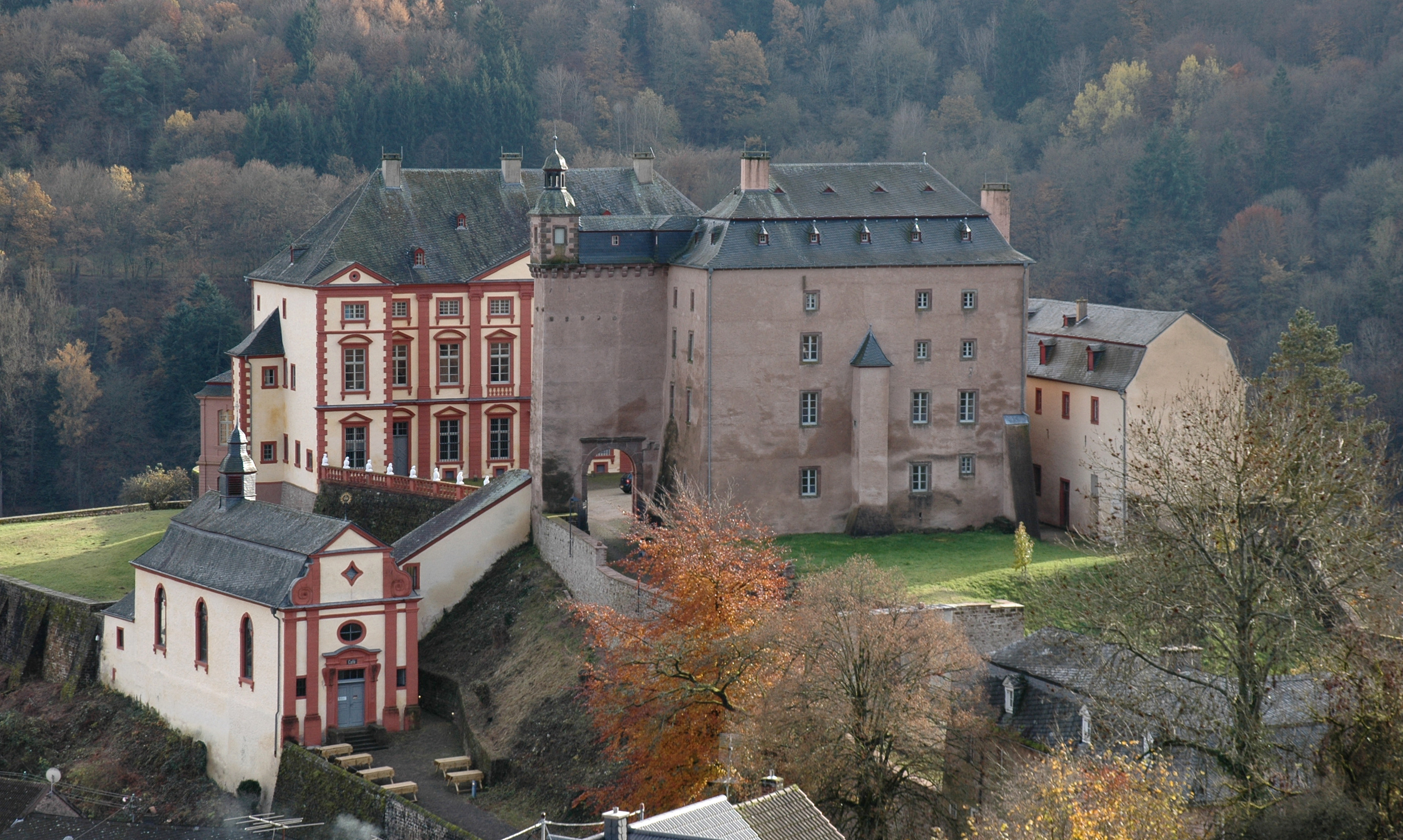 Nordansicht des Schlosses Malberg